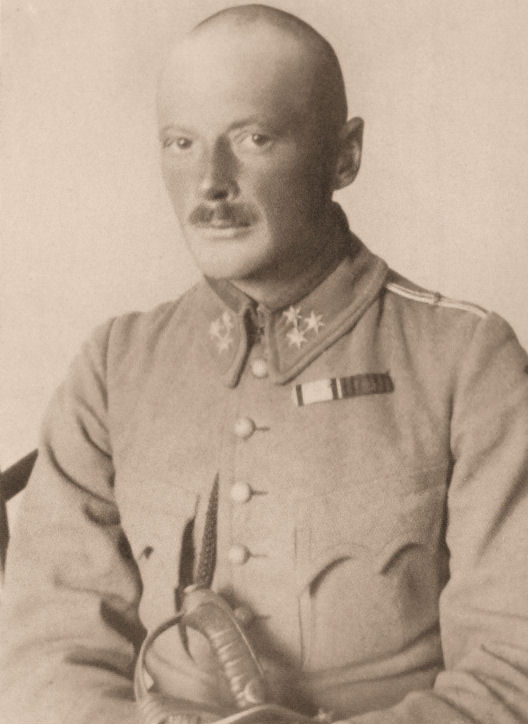 Rotmistrz Zbigniew Dunin-Wąsowicz (1882-1915).